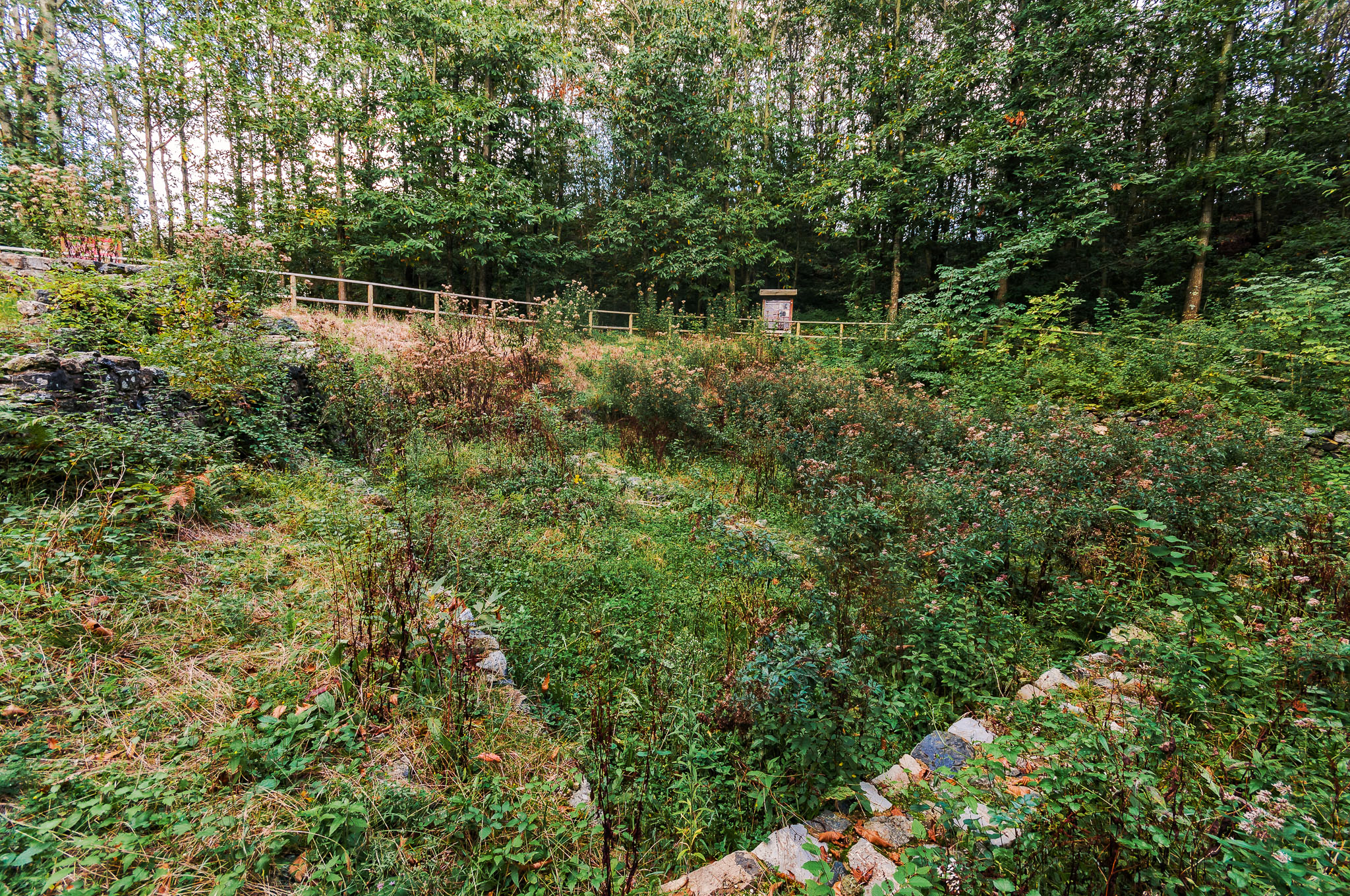 Complesso di San Nicolao di Pietra Colice - resti dell'ospitale medievale.